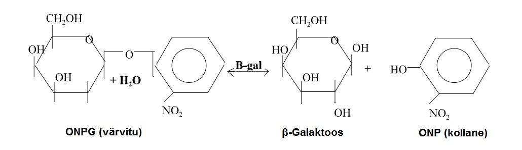 ONPG hüdrolüüs ONP + galaktoos